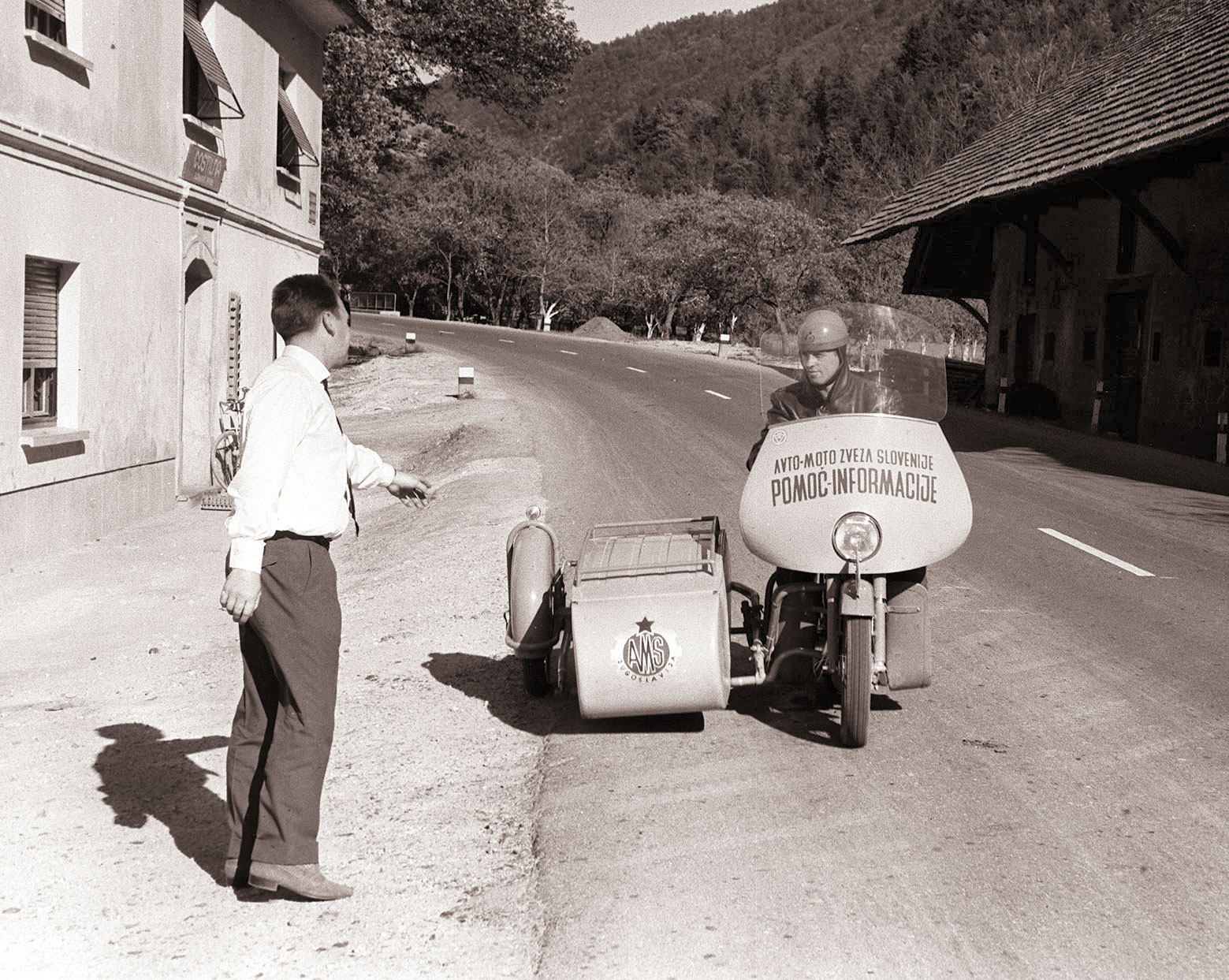 Potujoči avto-servis Avto-moto zveze Slovenije.